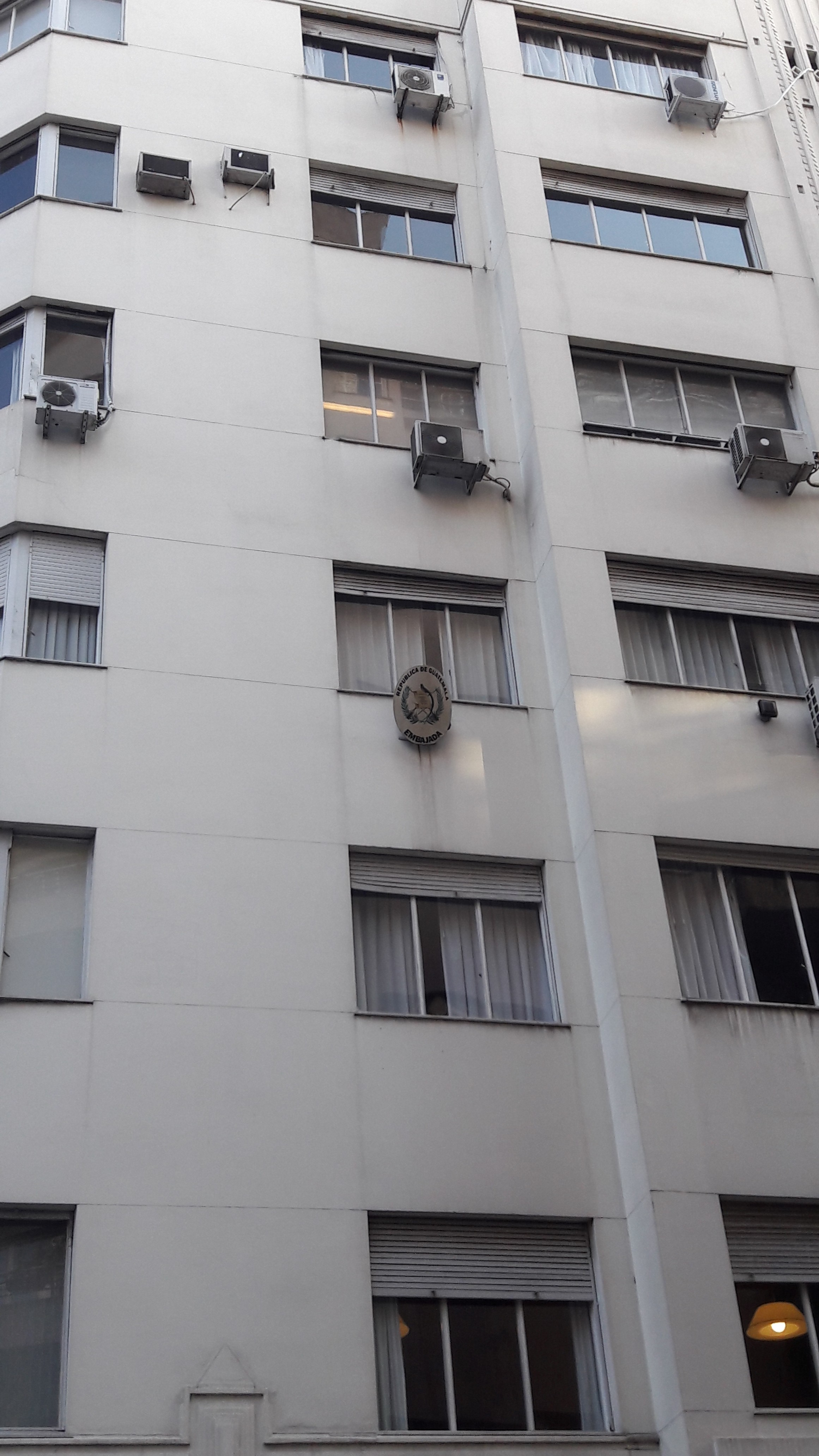 Embajada de Guatemala, Buenos Aires.